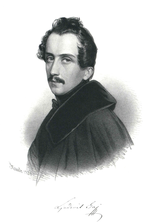 Gaj, Ljudevit (1809 - 1872)